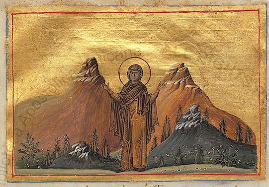 Saint Thecla Константинополь. 985 г. Миниатюра Минология Василия II. Ватиканская библиотека. Рим.